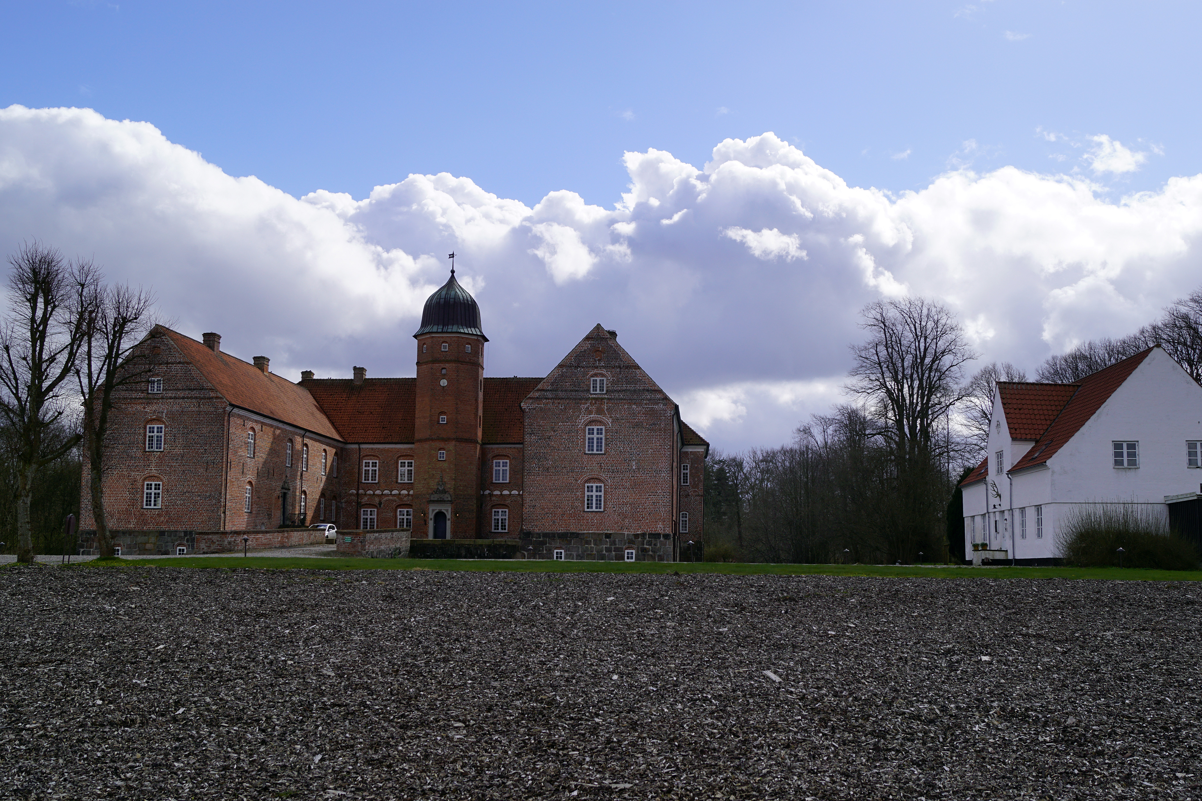 Nørlund Slot ved vestenden af Rold Skov